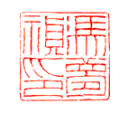 中文